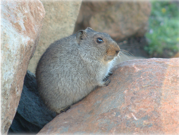 Sloggett's Rat (Otomys sloggetti)